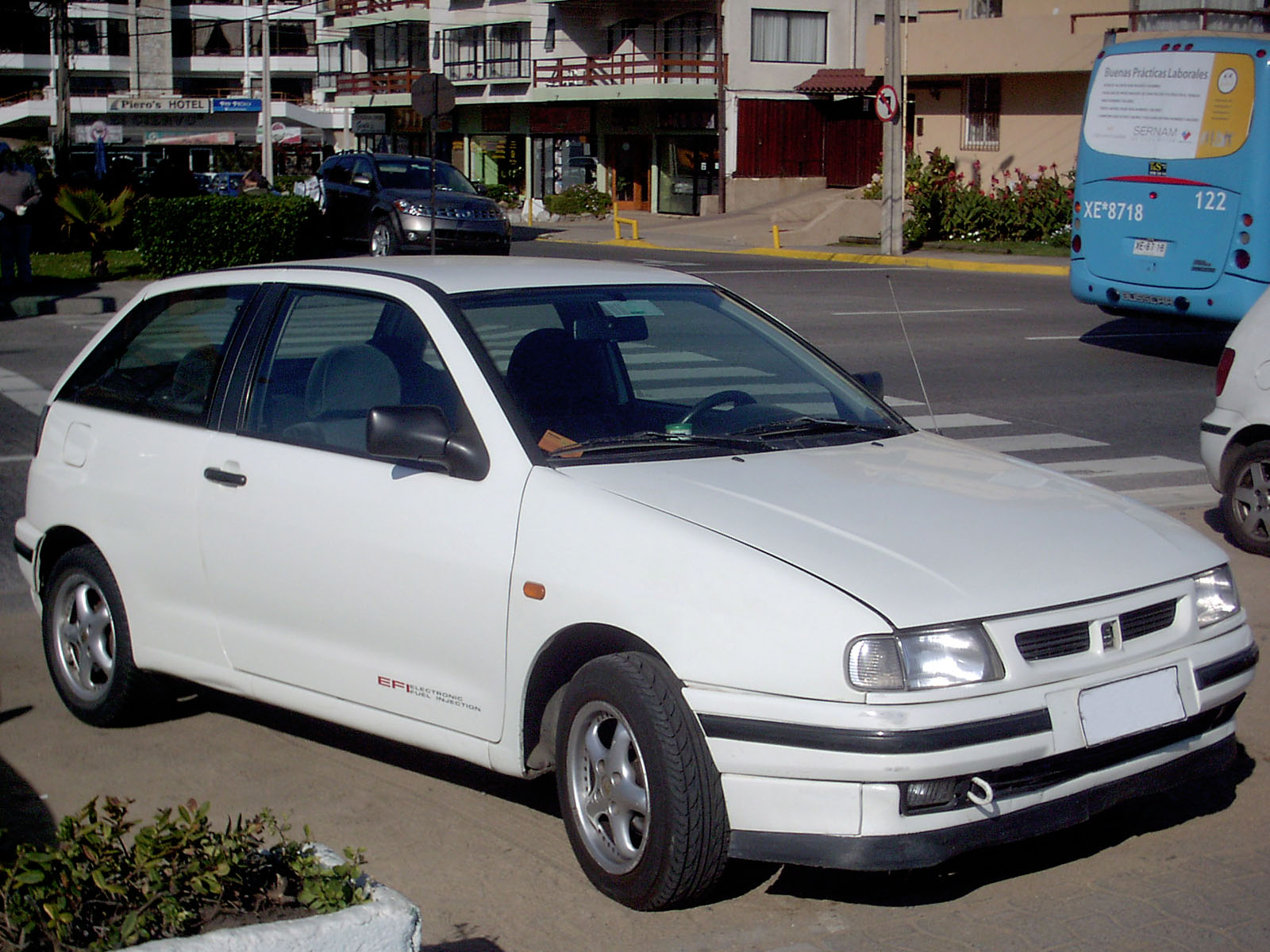 Seat Ibiza 1.4 GLX 1995